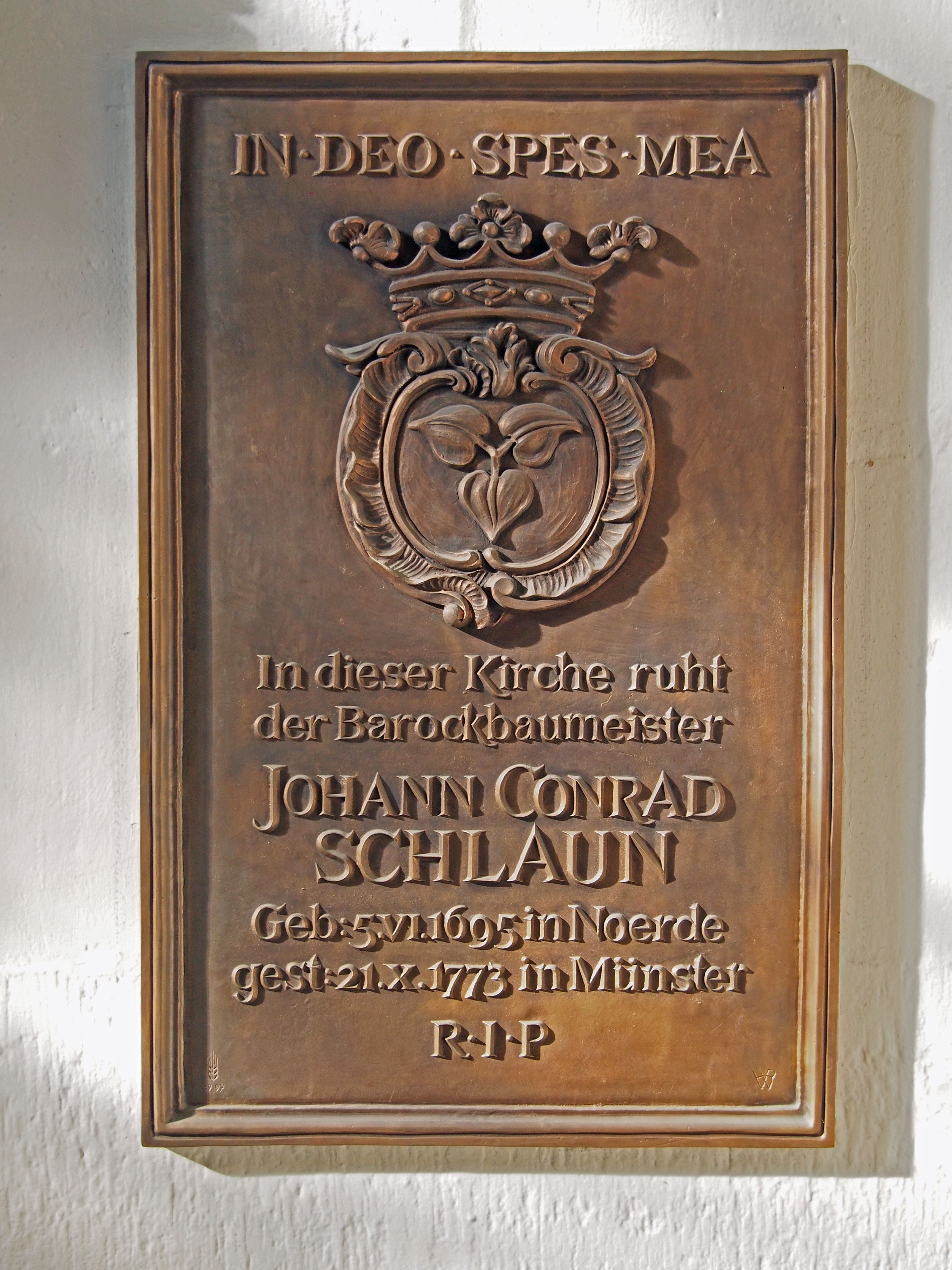 Gedenktafel an das Grabmal von Johann Conrad Schlaun in der Pfarrkirche Liebfrauen-Überwasser in Münster (Westfalen)